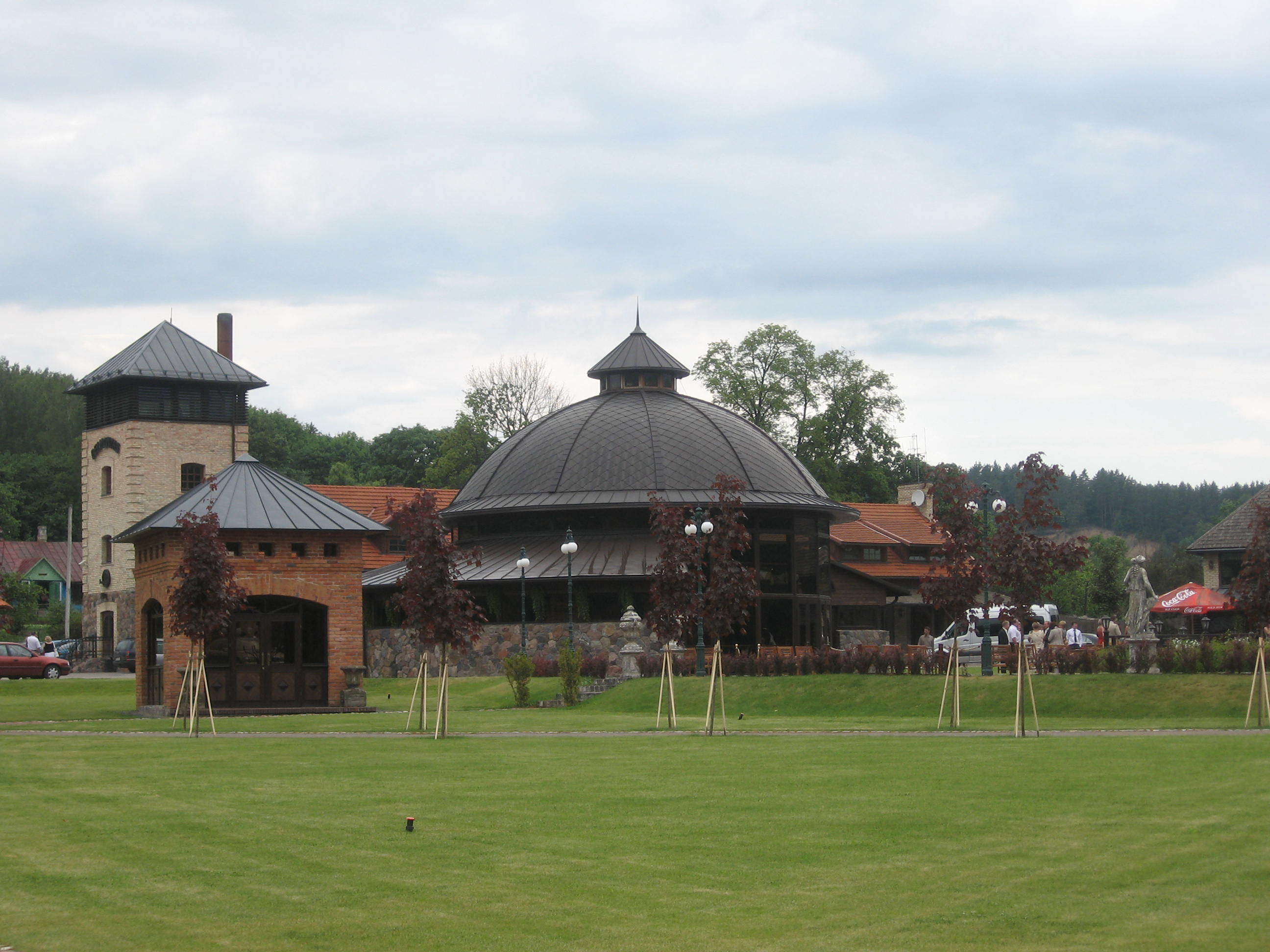 Belmonto parkas